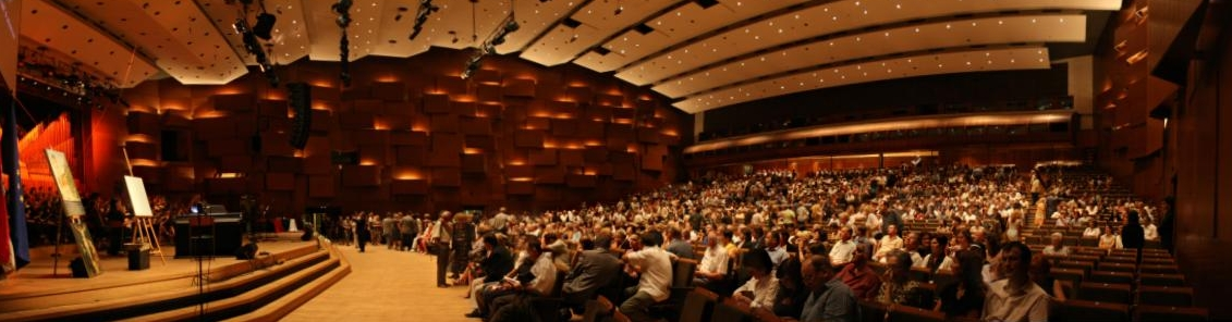 Dobrotvorni koncert "Križ nek' ti sačuva ime" u koncertnoj dvorani Vatroslav Lisinski u Zagrebu.